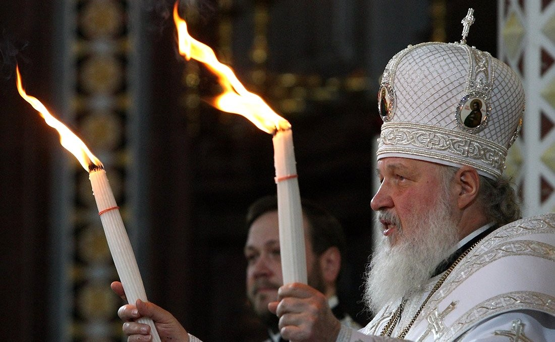 Патриарх Московский и всея Руси Кирилл с благодатным огнем на Пасхальном богослужении в Храме Христа Спасителя 4.4.2010